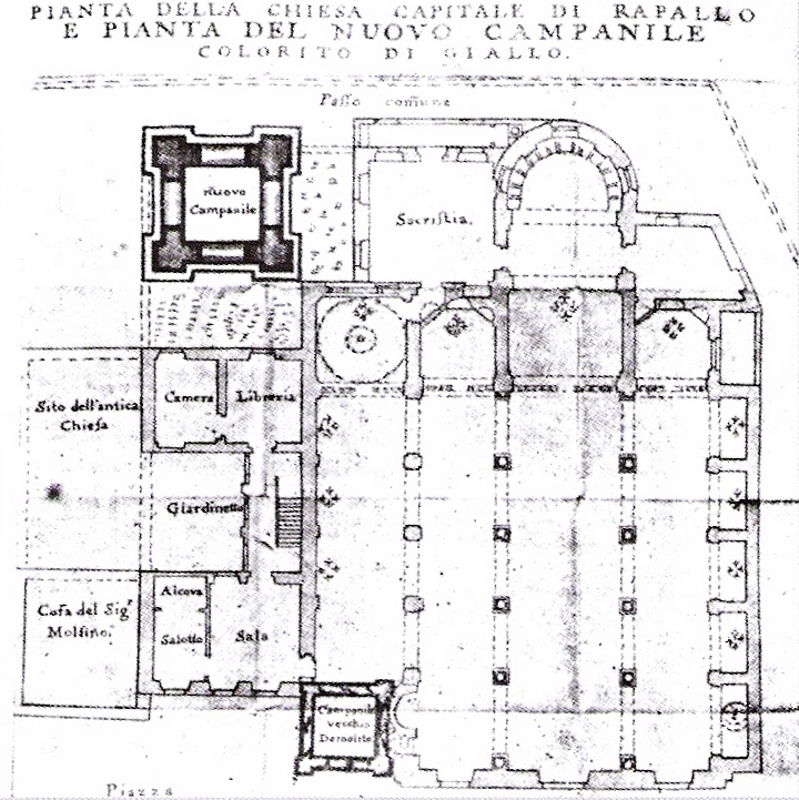 Planimetria della chiesa e dell'erigenda torre campanaria del 1753 ripresa in una stampa, Rapallo, Liguria, Italia